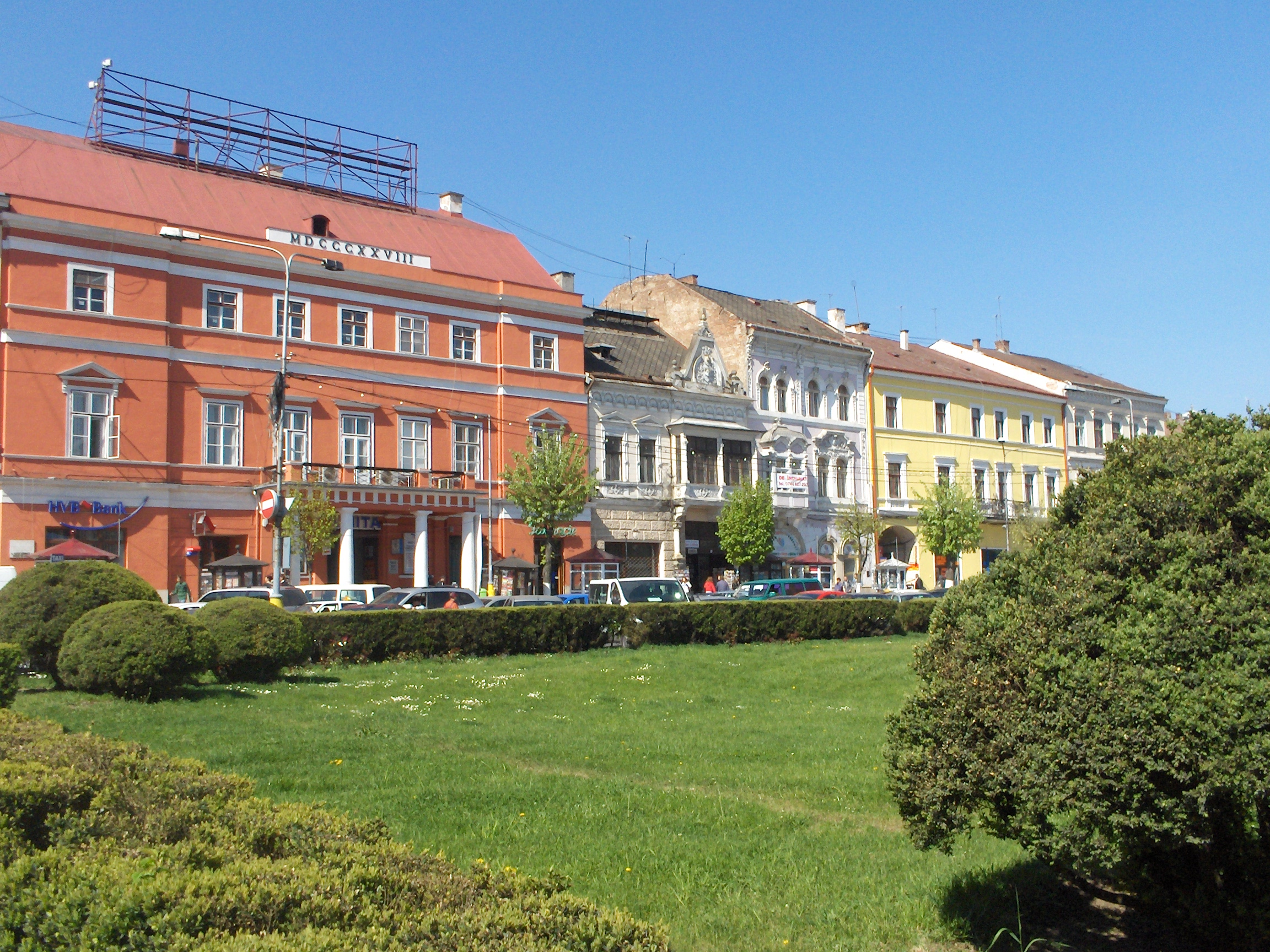 Josika Palace, Cluj-Napoca, Romania